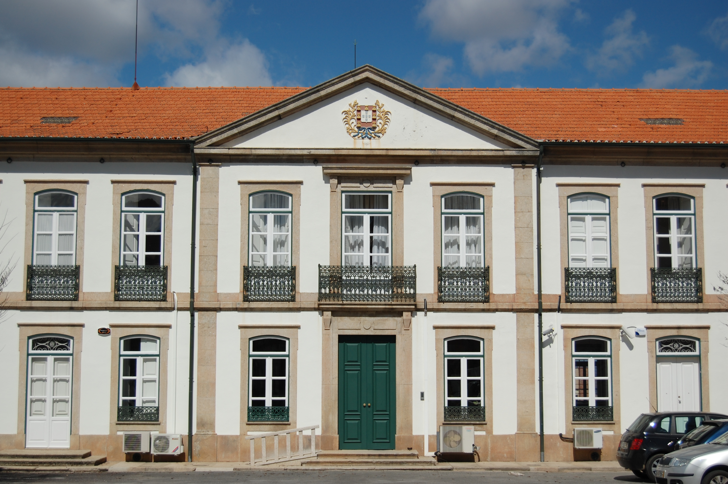 Sede do governo civil do distrito de Bragança, no nordeste de Portugal.